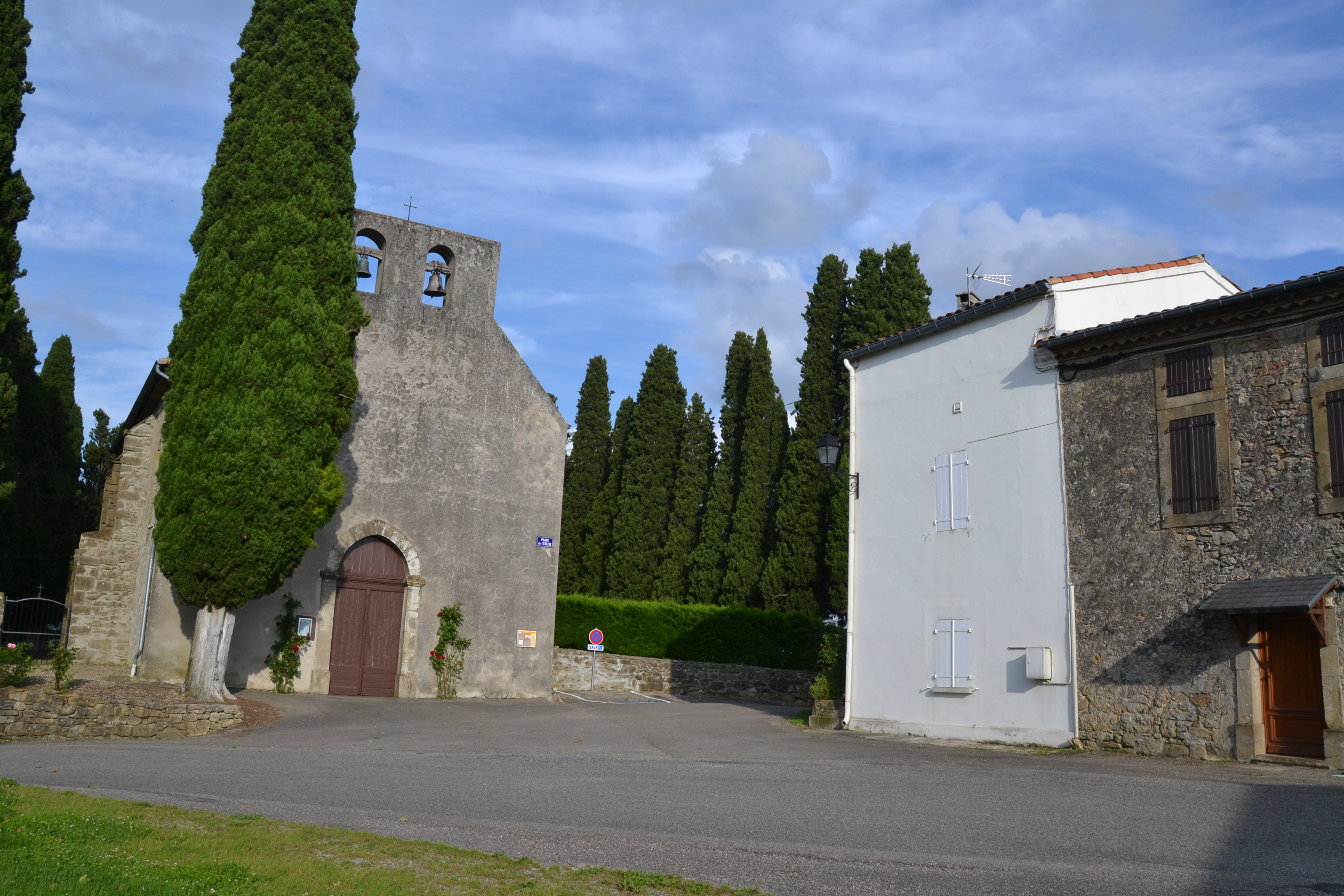 L'église Saint-Jean-Baptiste de Régat (Ariège, France).